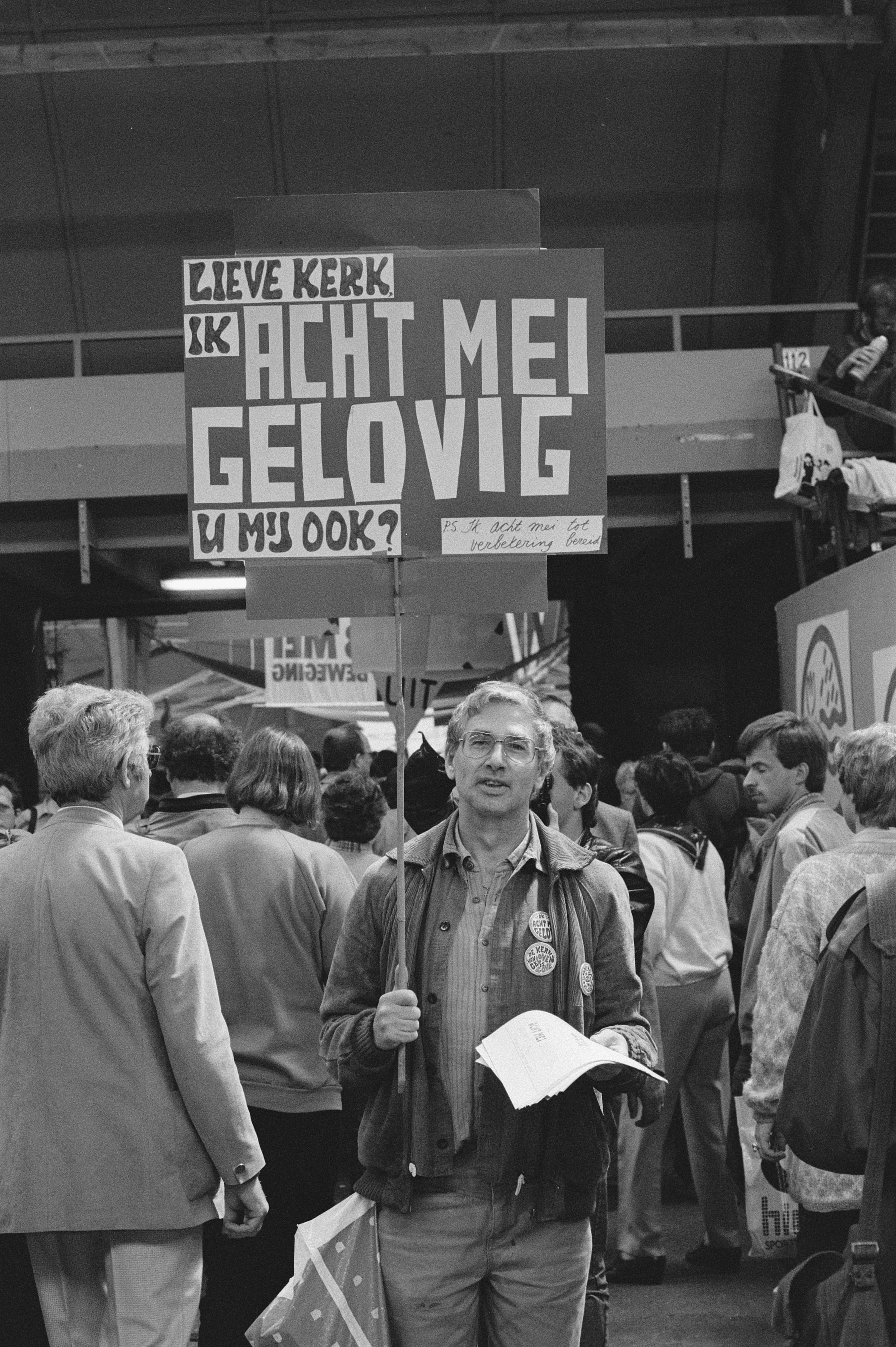 Collectie / Archief : Fotocollectie Anefo Reportage / Serie : [ onbekend ] Beschrijving : Bijeenkomst 8 mei beweging in Den Bosch ; gelovige met spandoek Datum : 8 mei 1986 Locatie : Den Bosch Trefwoorden : bijeenkomsten, spandoeken Fotograaf : Gerrits, Roland / Anefo Auteursrechthebbende : Nationaal Archief Materiaalsoort : Negatief (zwart/wit) Nummer archiefinventaris : bekijk toegang 2.24.01.05 Bestanddeelnummer : 933-6503